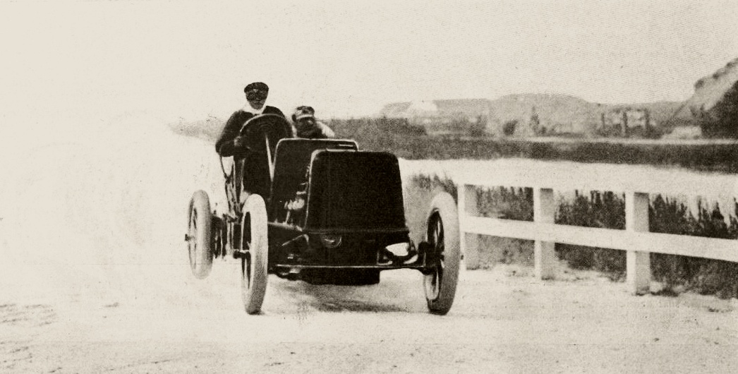 Willy Pöge, vainqueur des 10 kilomètres d'Ostende contre-la-montre en 1903sur Mercedes - La Vie au Grand Air du 17 juillet 1903, p.486